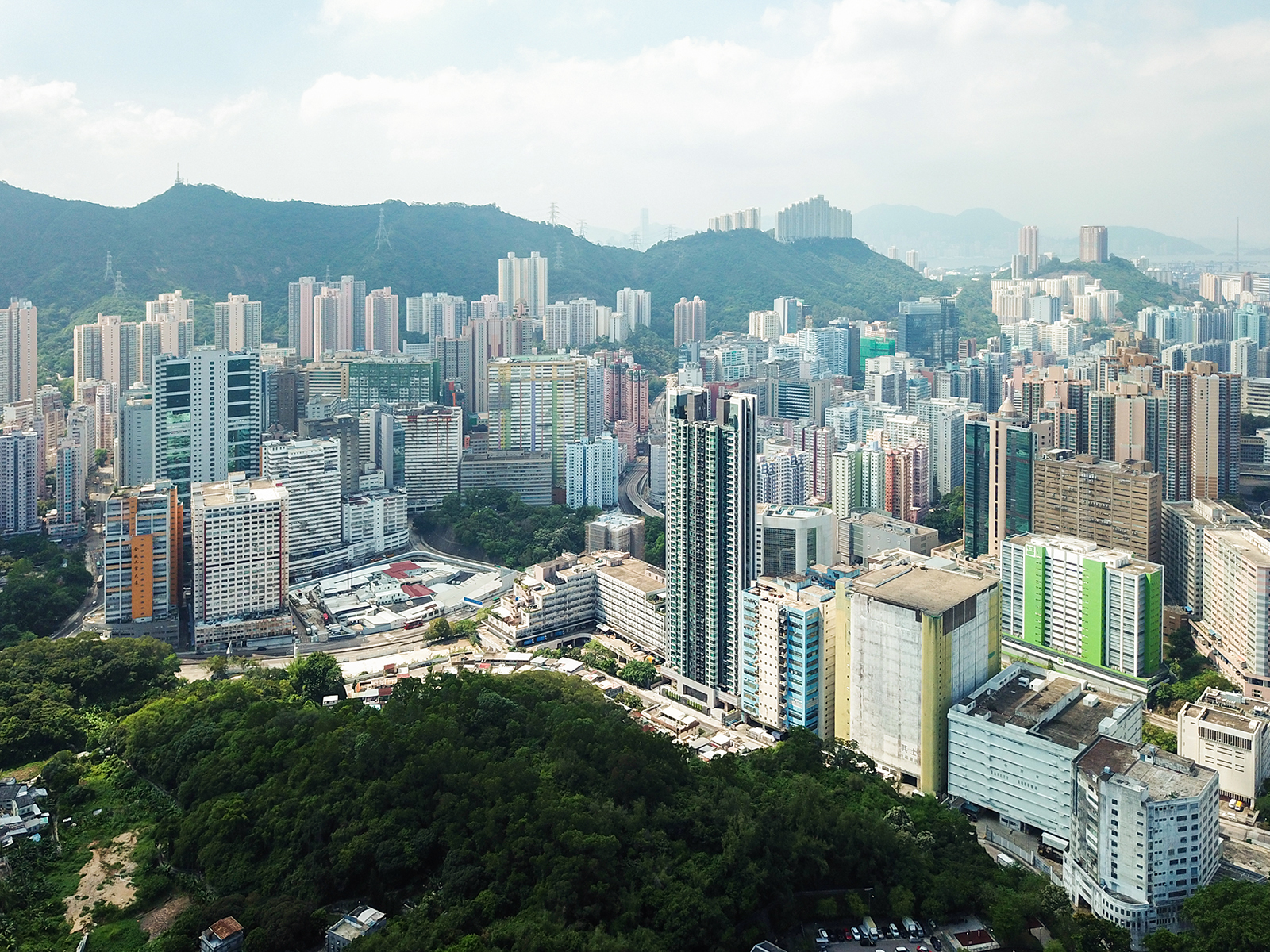 Kwai Chung Industrial Buildings